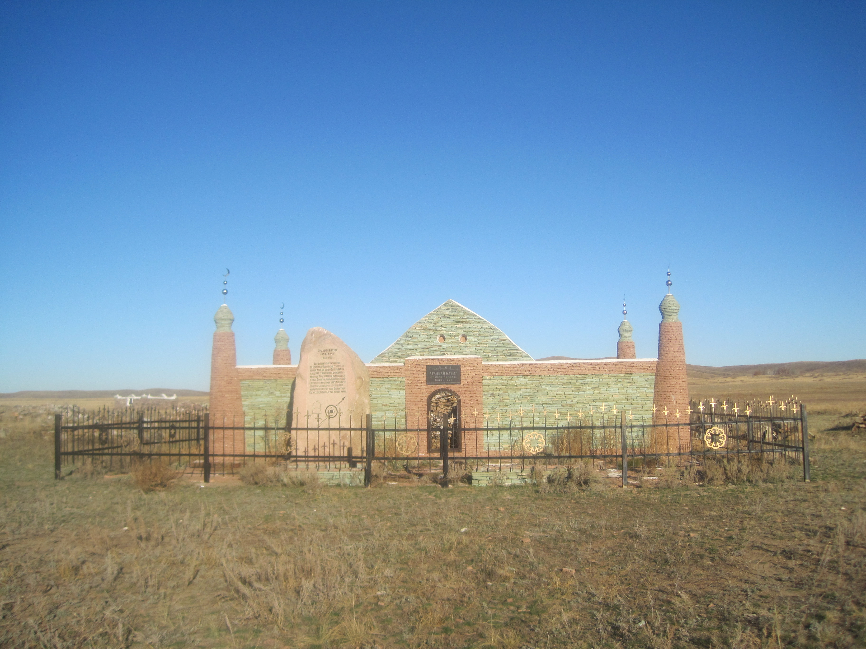 Аралбай батыр кесенесі